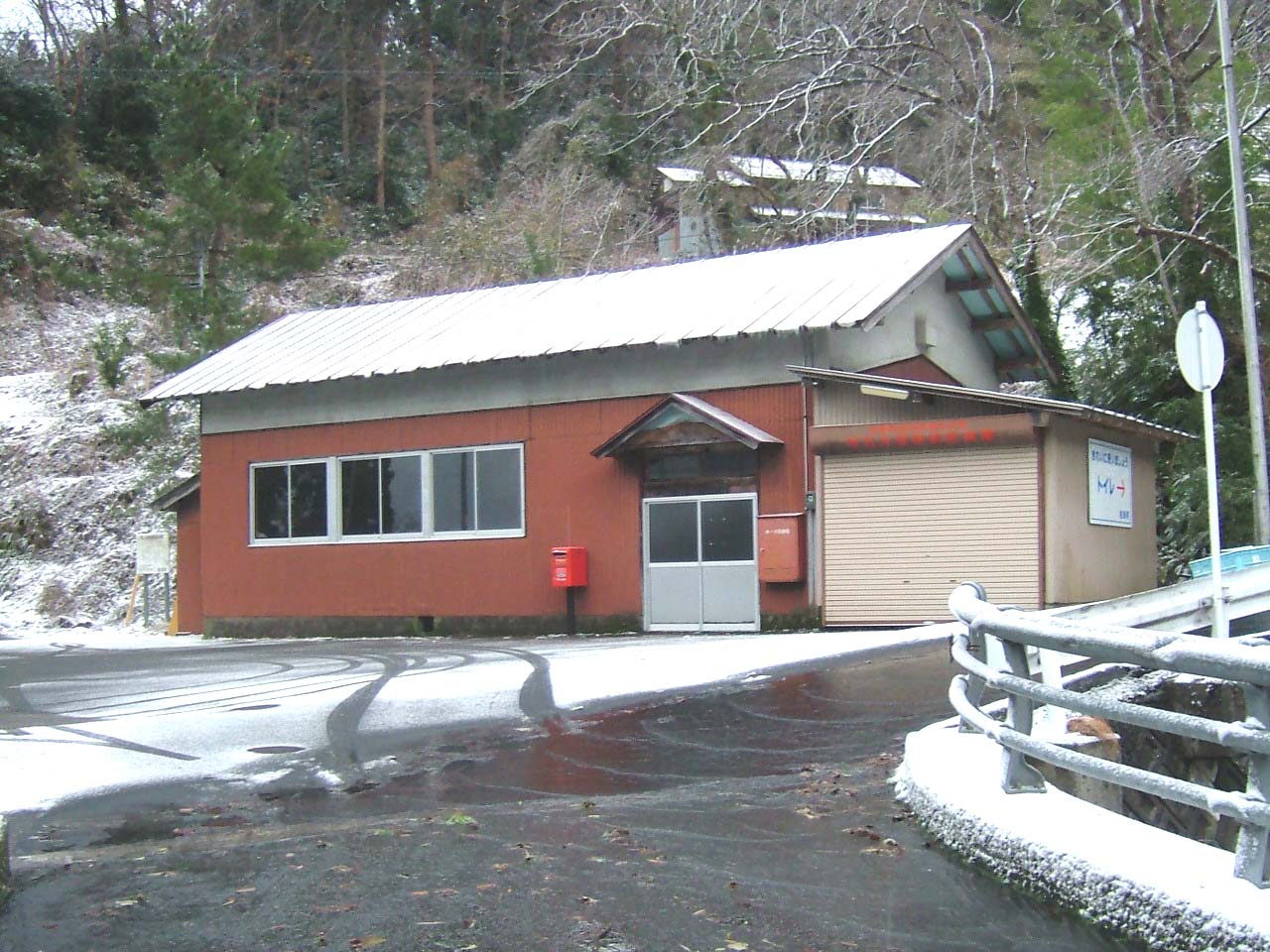 岩美町立岩美南小学校旧鳥越季節間分校